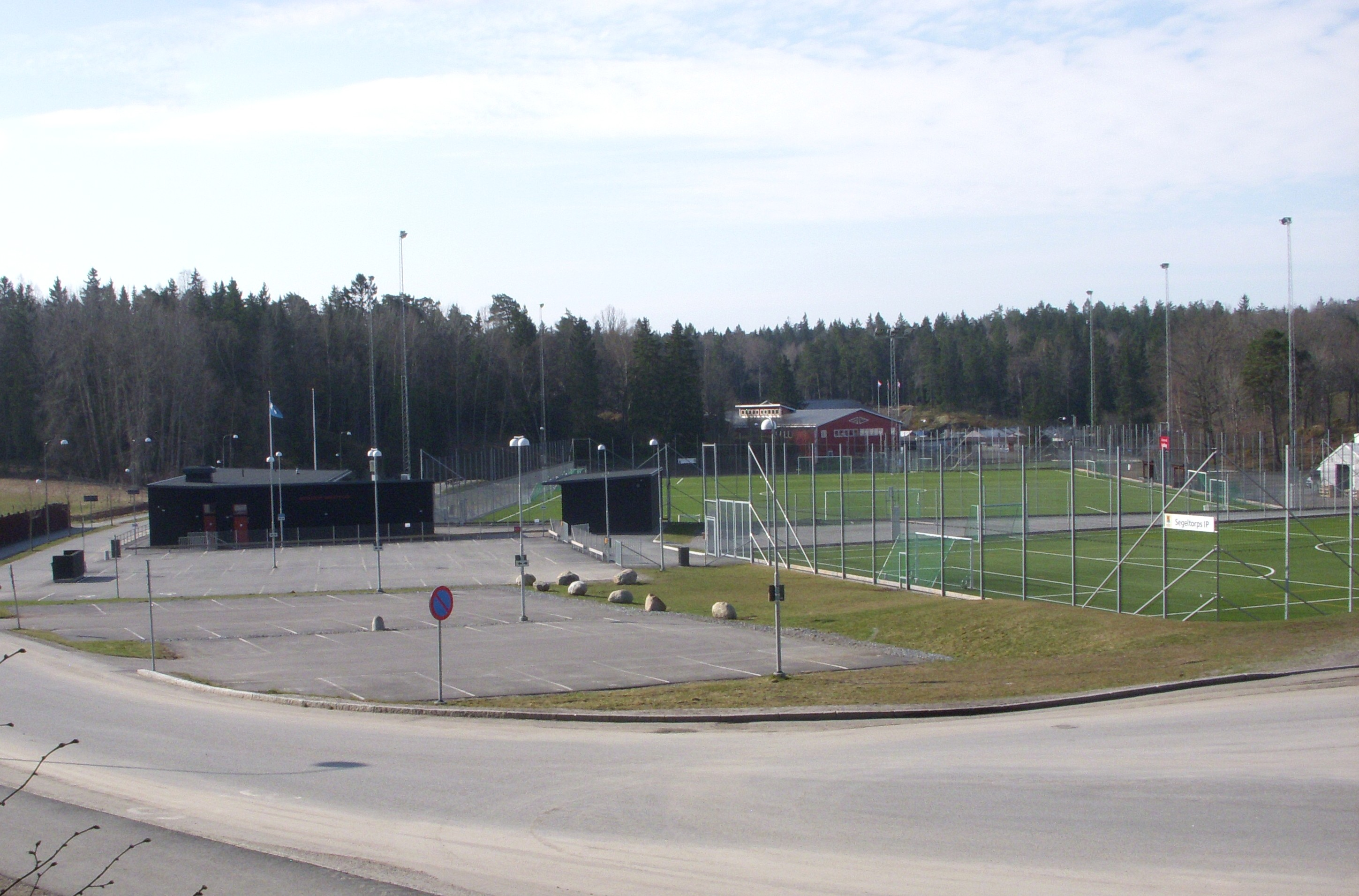 Segeltorps IP